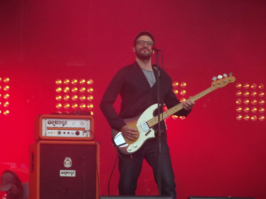 Zdjęcie zrobione podczas pierwszego dnia Coke Live Music Festival 2012 w Krakowie.